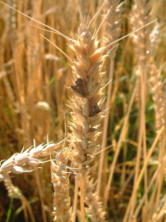 Beschreibung: Weizenähre mit Mutterkorn Fotograf: Benutzer:burgkirsch 2003 Quellenangabe und Beleg an burgkirsch(at)web.de erbeten.